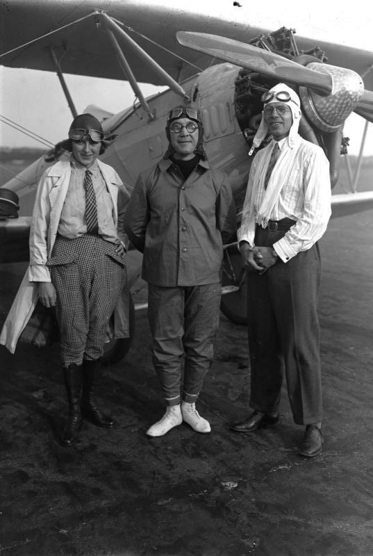 Der bekannte deutsche Kunstflieger Prinz Eugen zu Schaumburg-Lippe (rechts in Bilde) wurde bei dem grossen deutschen Flugzeugunglück in England getötet. Die Königin von England hat der Familie des Verstorbenen ihr Beileid ausgedrückt. Die letzte Aufnahme des Prinzen Eugen zu Schaumburg-Lippe auf dem Centralflughafen in Berlin-Tempelhof während einer Flugvorführung mit dem deutschen Luftakrobaten Oskar Dimphel (Mitte), der Fallschirmpilotin Frau Triebner (links).